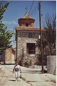 Vista de la iglesia parroquial de Santa Bárbara de Mas del Olmo, Ademuz (Valencia) 09.001-004.